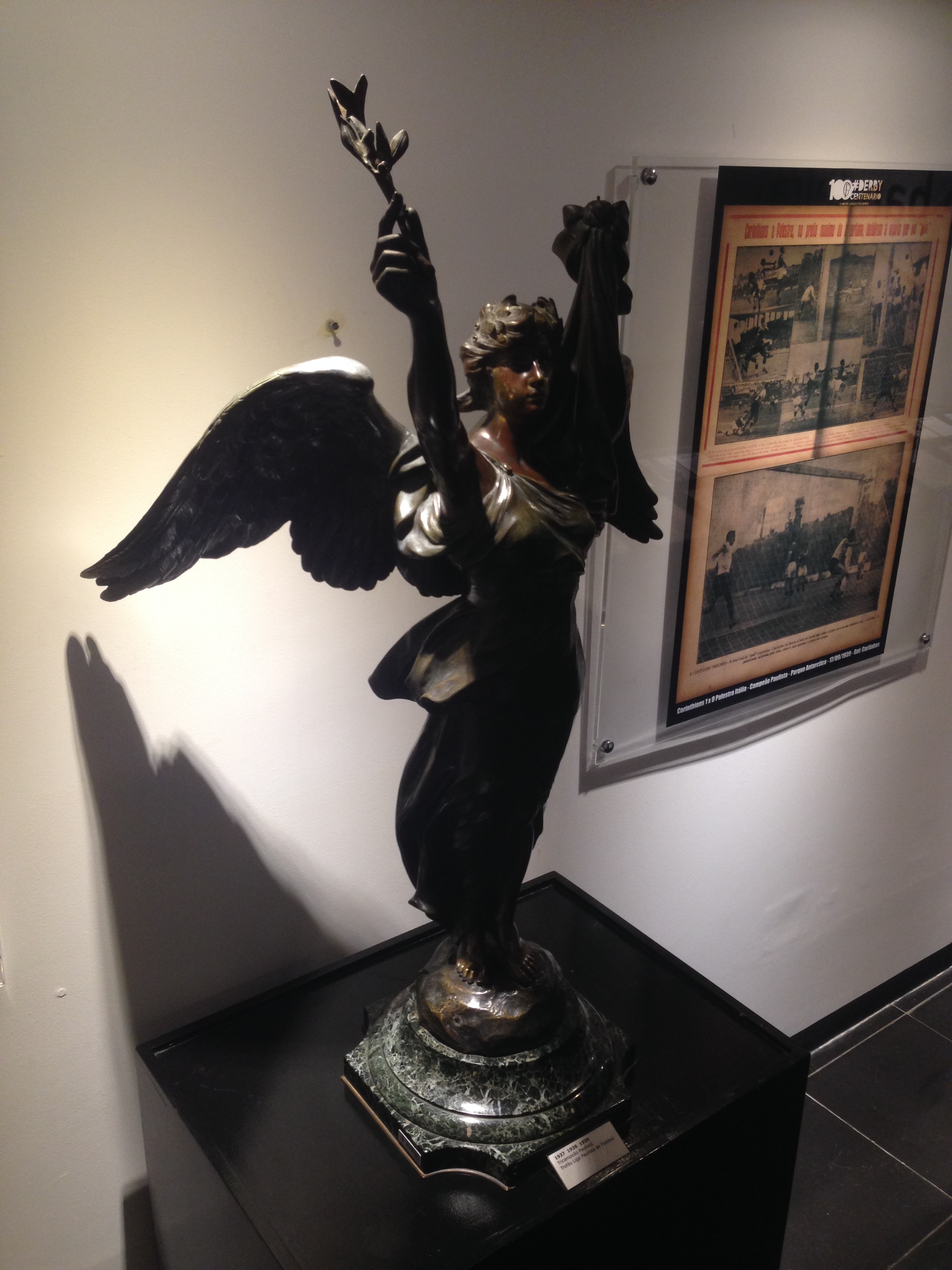 A foto foi tirada no Memorial do Corinthians